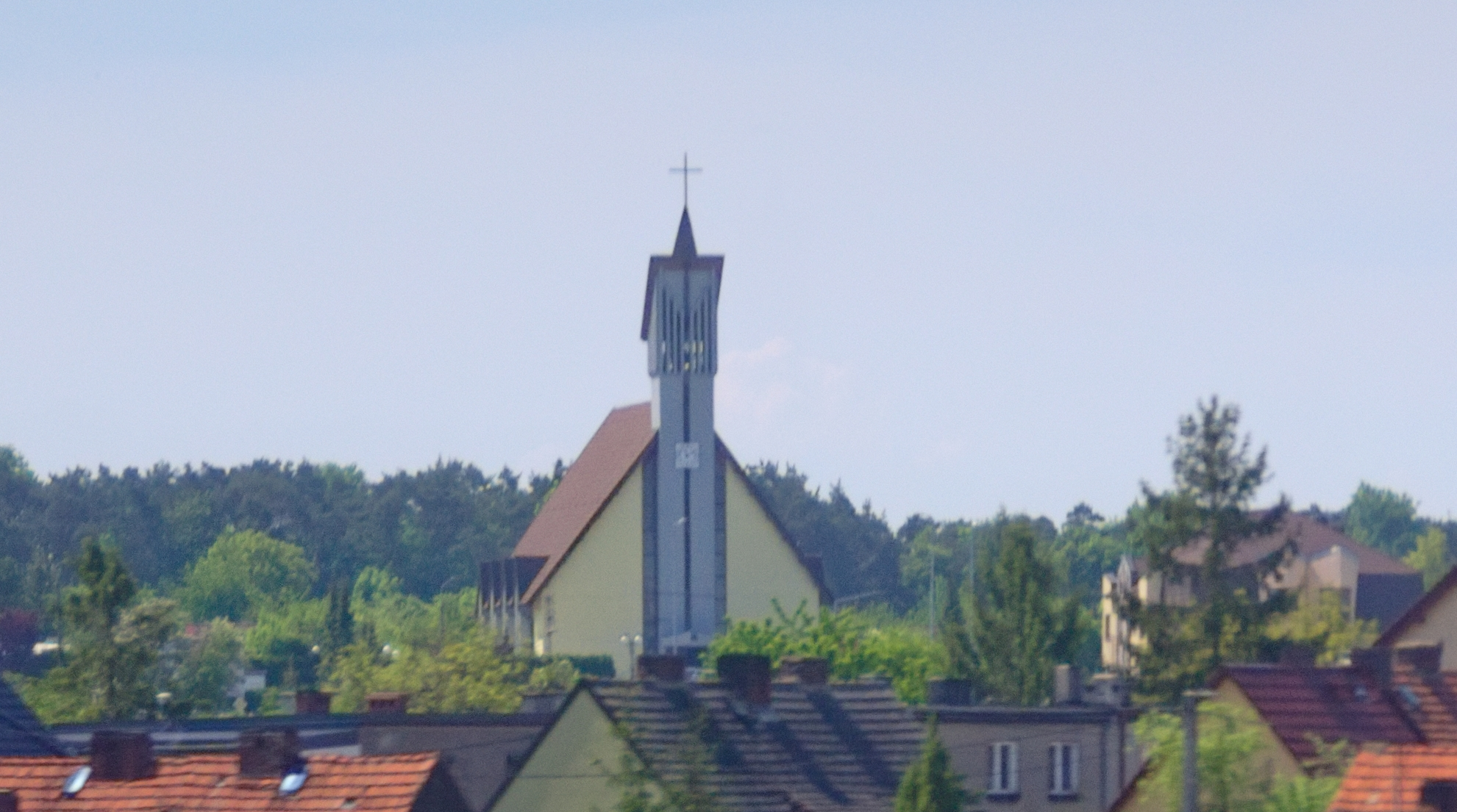 kościół Ducha Świętego w Krapkowicach, widok z okna autobusu jadącego drogą A4